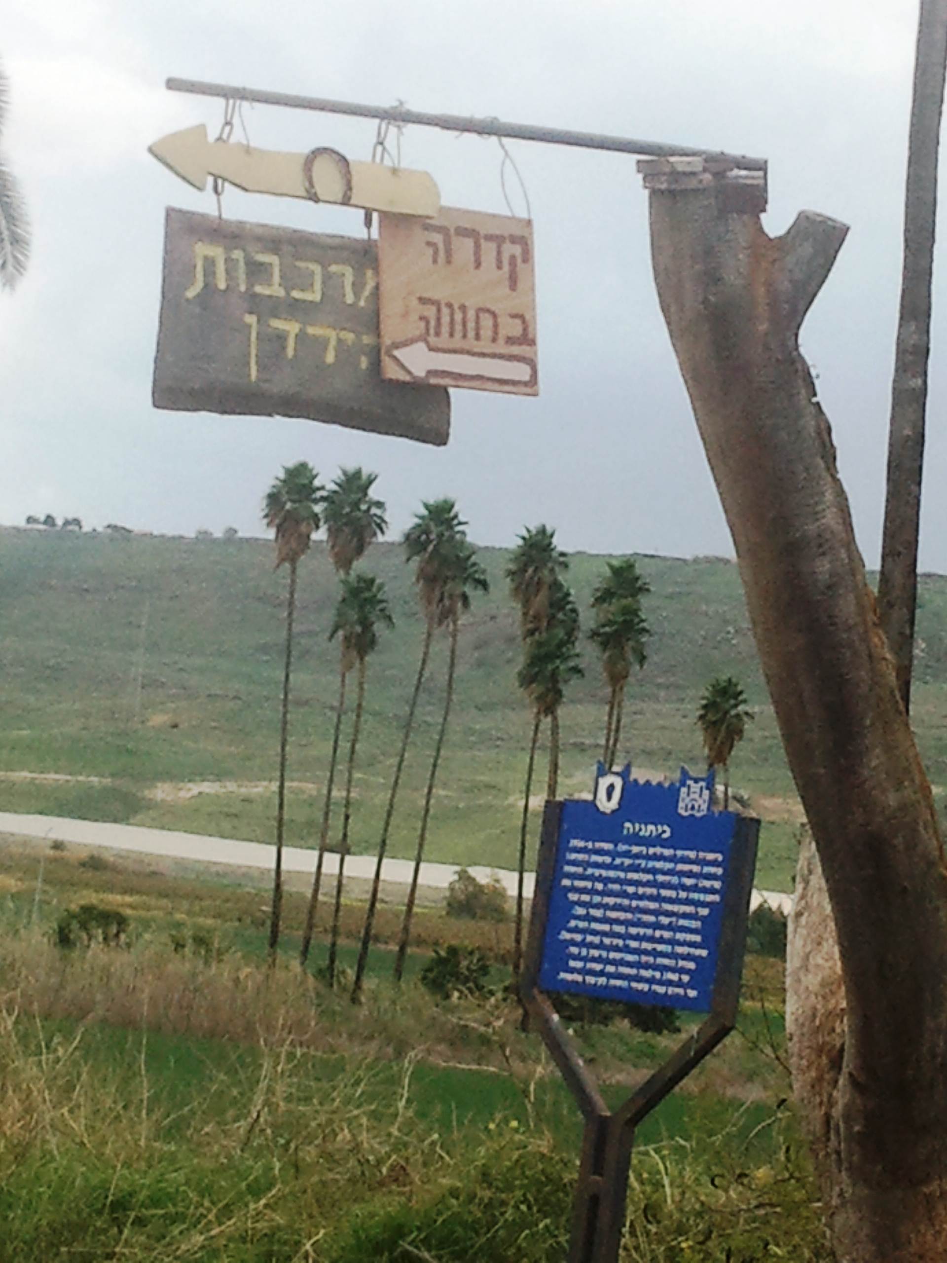 ביתניה תחתית הוא שמה של חווה חקלאית שנוסדה ב-1912 על ידי יק"א, ממערב לנהר הירדן ומדרום לחוות כנרת ליד דגניה א. המבנה ששרד הוא אתר מורשת בישראל